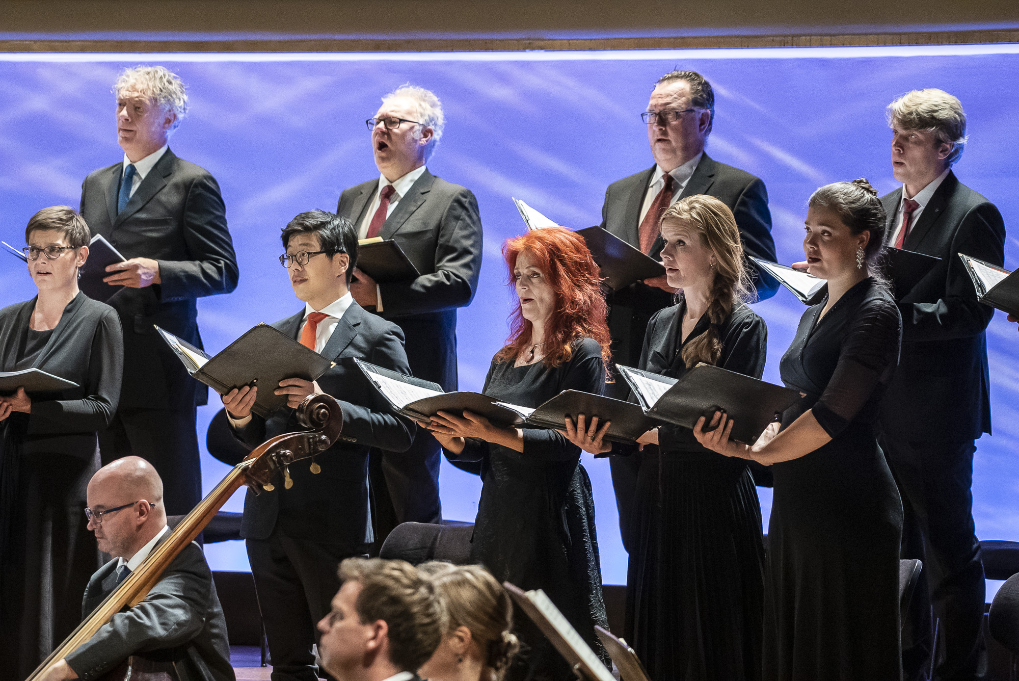 Nederlands Kamerkoor, J.S. Bach Weihnachts-Oratorium BWV 248, Praha, Rudolfinum, Collegium 1704, Peter Dijkstra dirigent, sólisté Hannah Morrison soprán, Maarten Engeltjes kontratenor, Benedikt Kristjansson tenor, Tobias Berndt bas